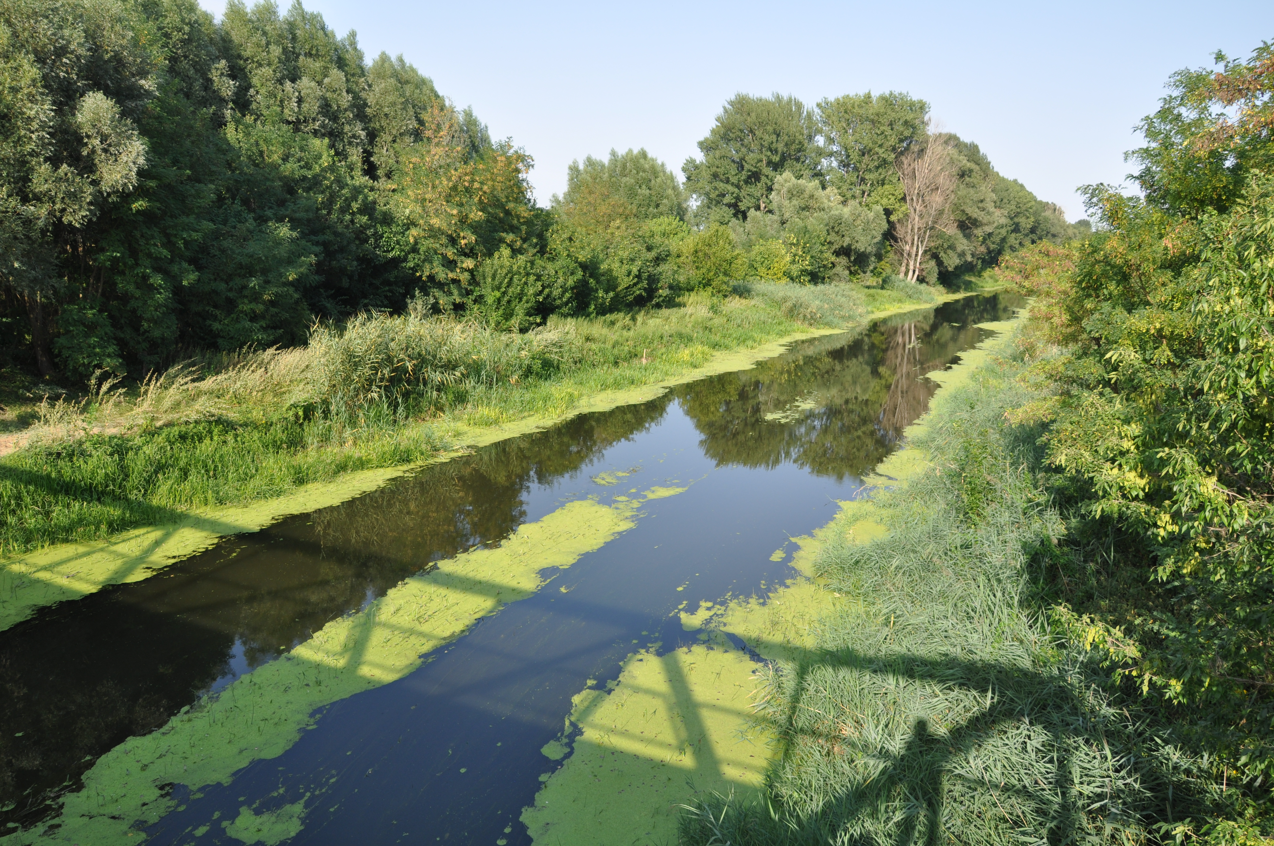 Die Rabnitz entsteht in Niederrösterreich und mündet in einen Seitenarm der "kleinen Donau" ( Moson Duna ) in der Nähe der ungarischen Stadt Györ ( Raab ).